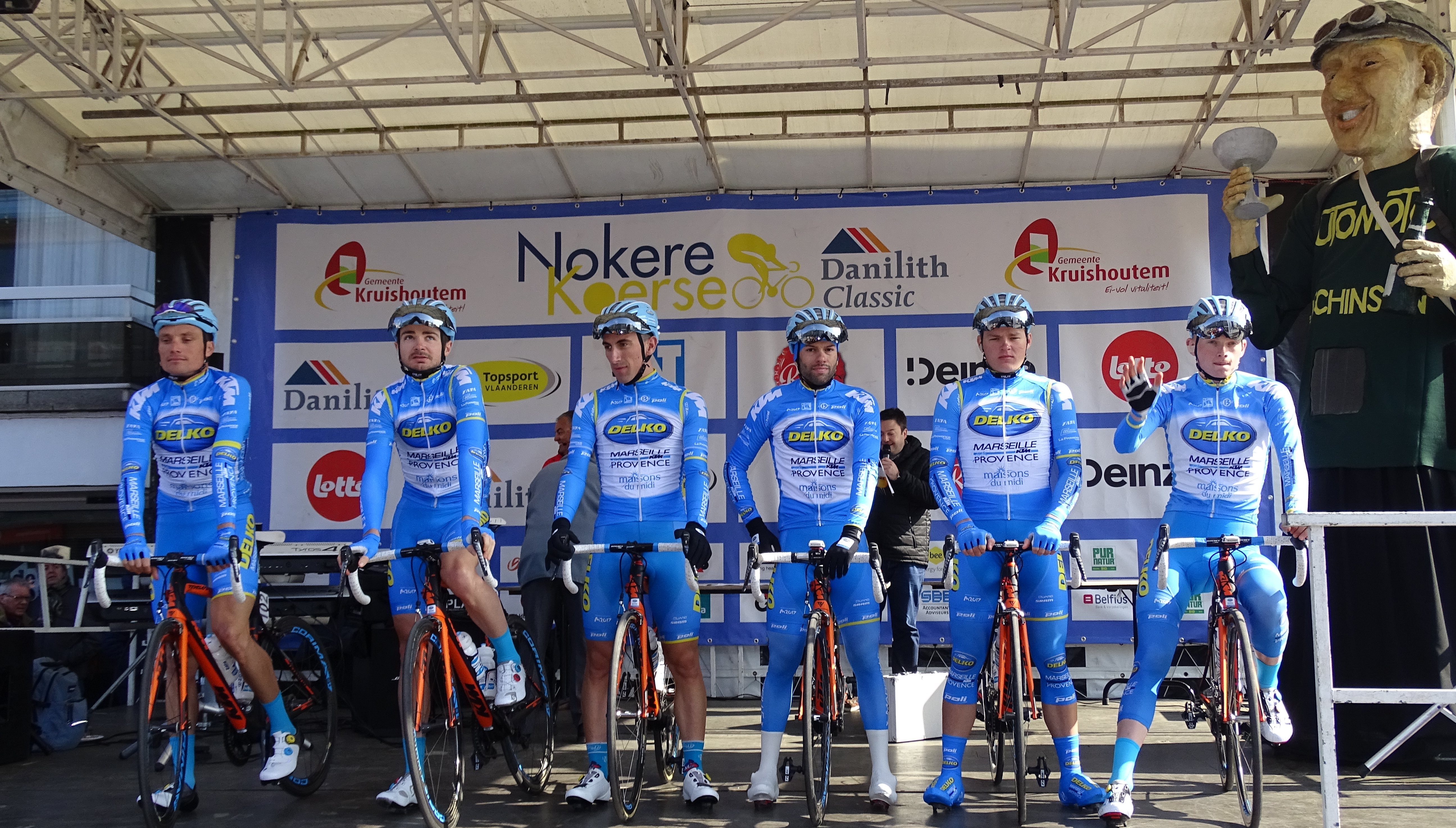 Reportage réalisé le mercredi 16 mars à l'occasion du départ de la Nokere Koerse 2016 à Deinze, Belgique.